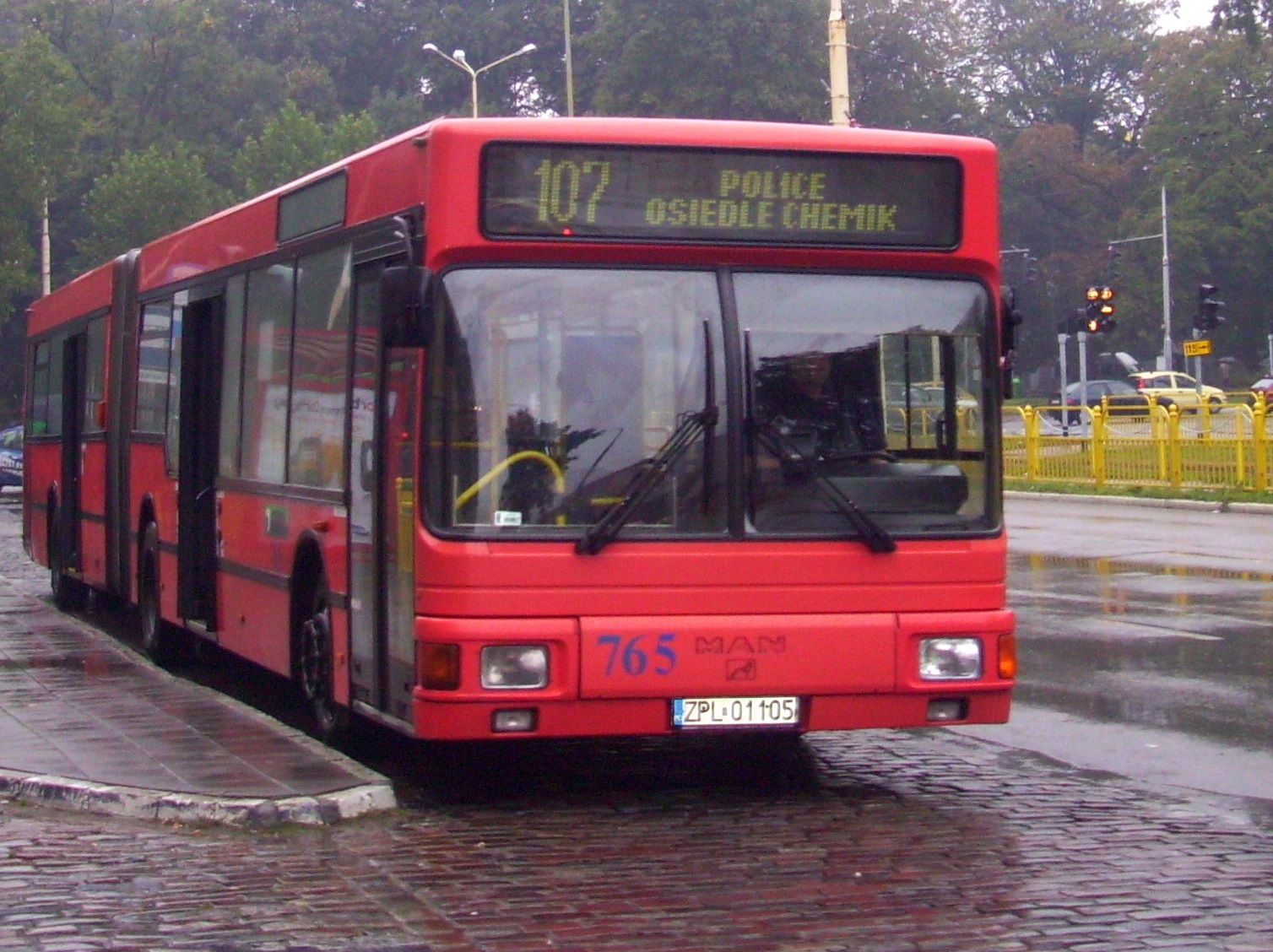 MAN NG 262 bus (#765, reg. ZPL 01105) in Szczecin, Poland. Built 1998, SPPK Police operator.